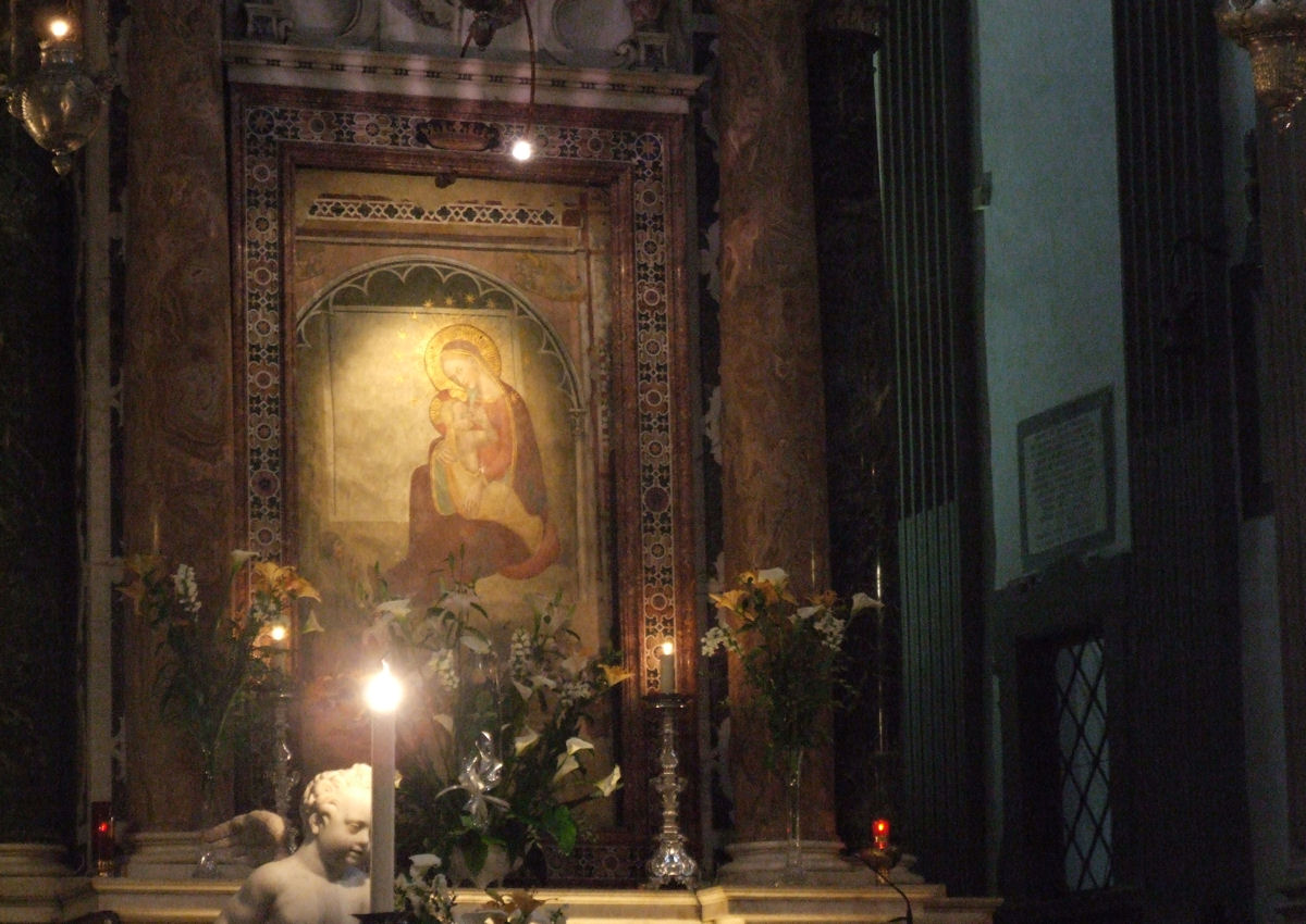 Chiesa Madonna del Umilta, Pistoia, Italy